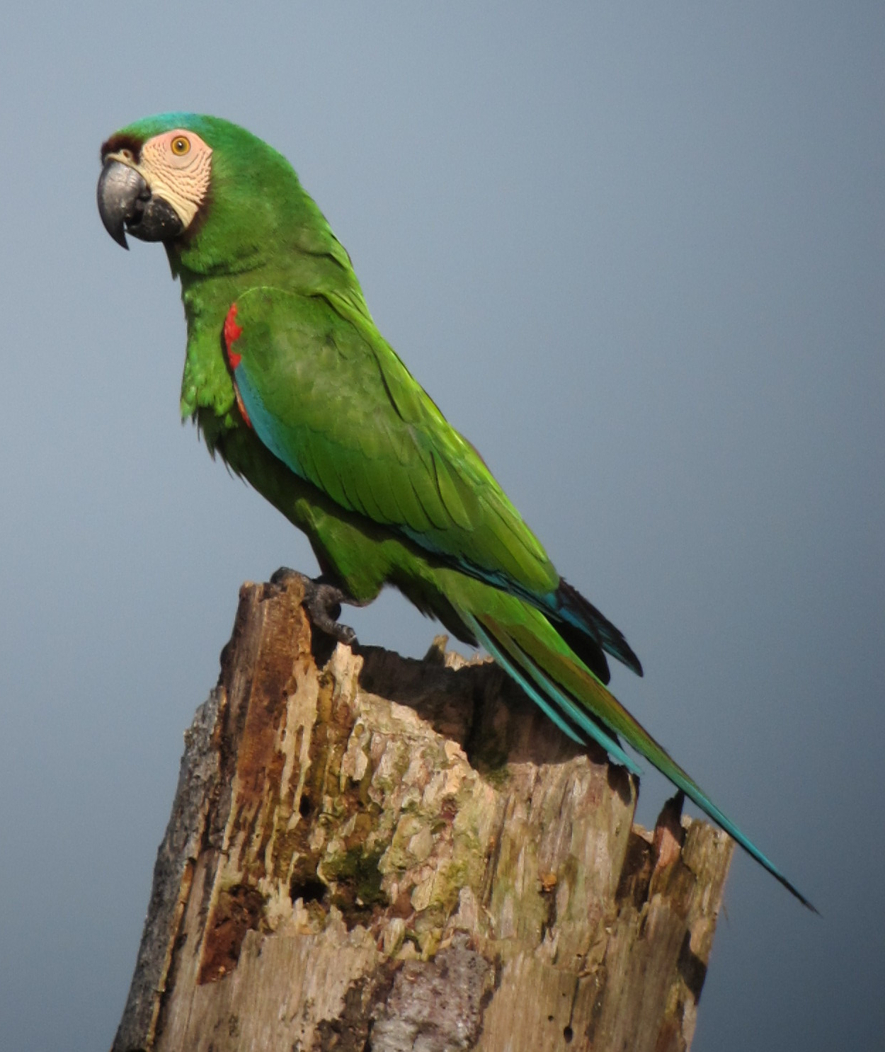 Cimitarra, Santander, Colombia